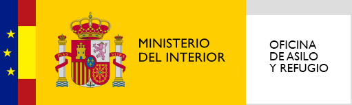 Logo de la Oficina de Asilo y Refugio